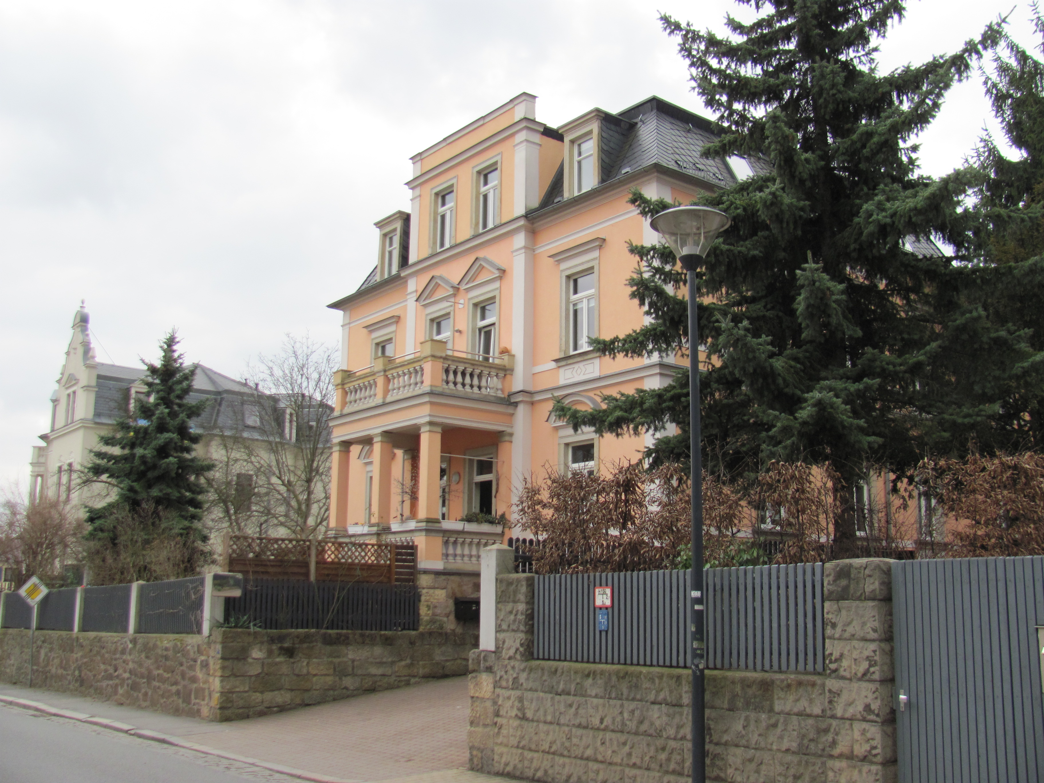 Radebeul-Niederlößnitz, Mietvilla Robert Wilhelm Häbold